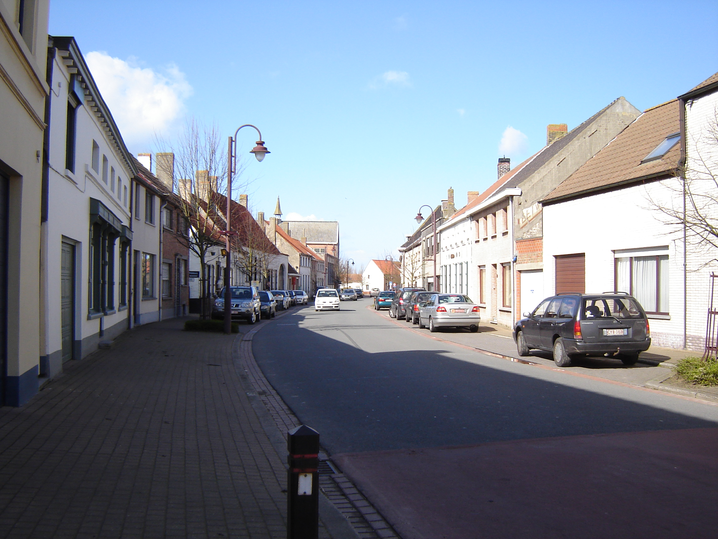 Dorpstraat in Klemskerke Dorpstraat, main street in Klemskerke, De Haan, West Flanders, Belgium